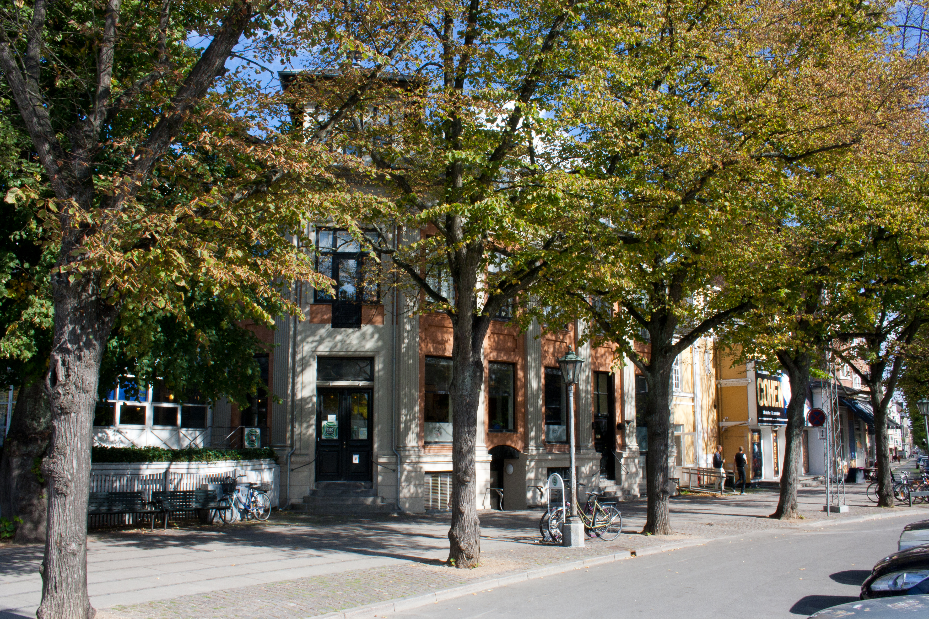 Frederiksberg Allé 104